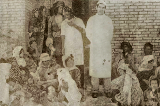 فریدریش آلمانی ، دکتر نخستین درمانگاه شهری بوکان